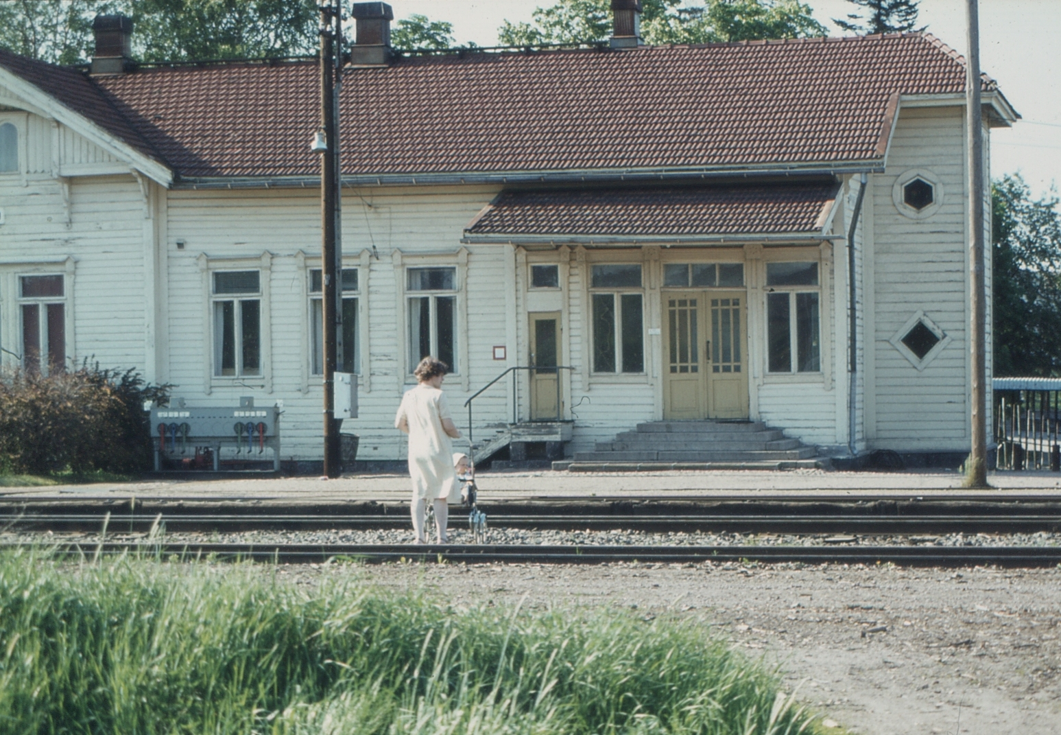 1970-luvun jälkipuoliskolla pääsi Turku-Helsinki tien ylitettyään polkua pitkin radan viereen ja suoraan sen yli asemalle.